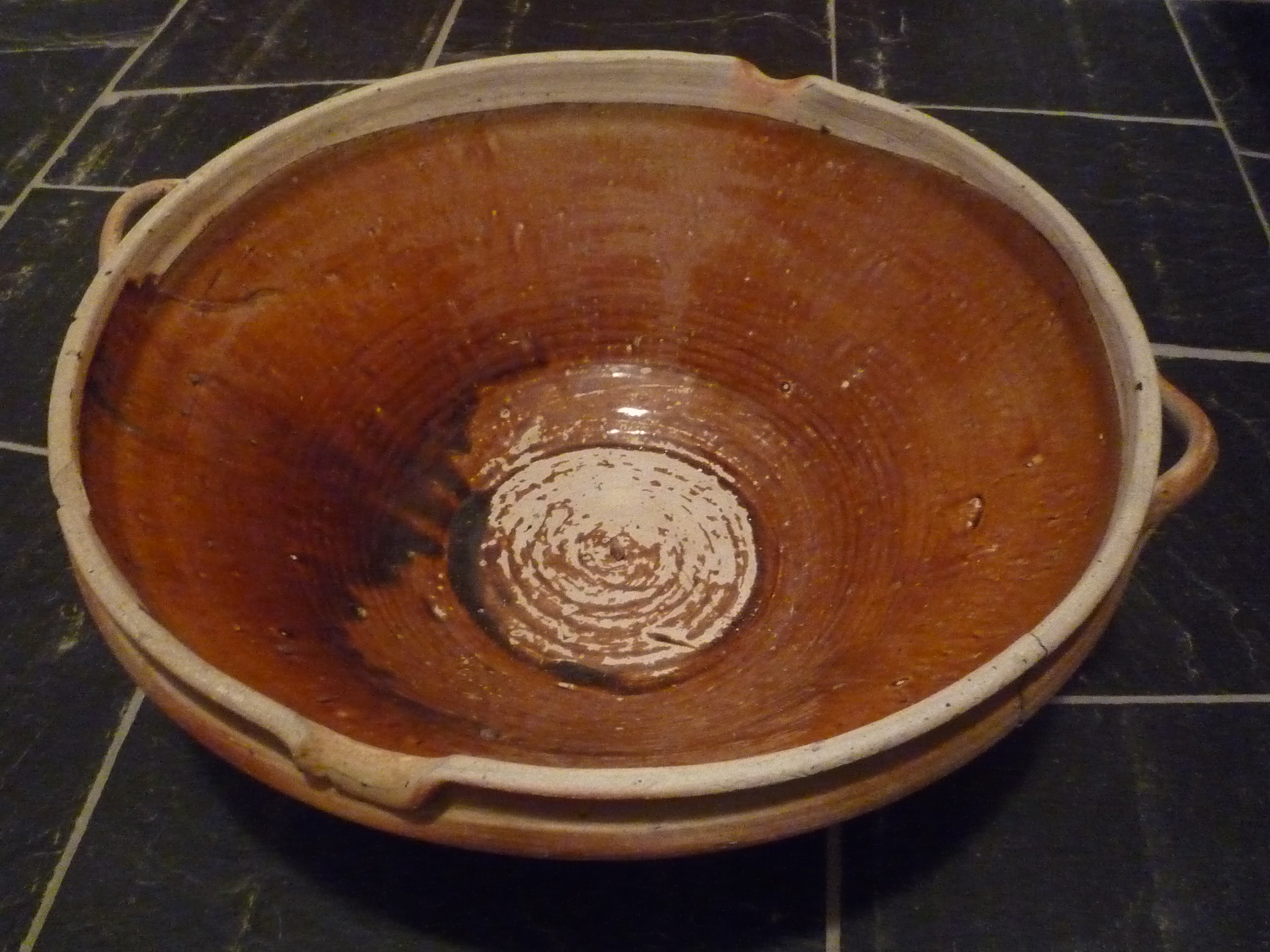 Récipient diamètre 48 cm en grès vernissé intérieurement